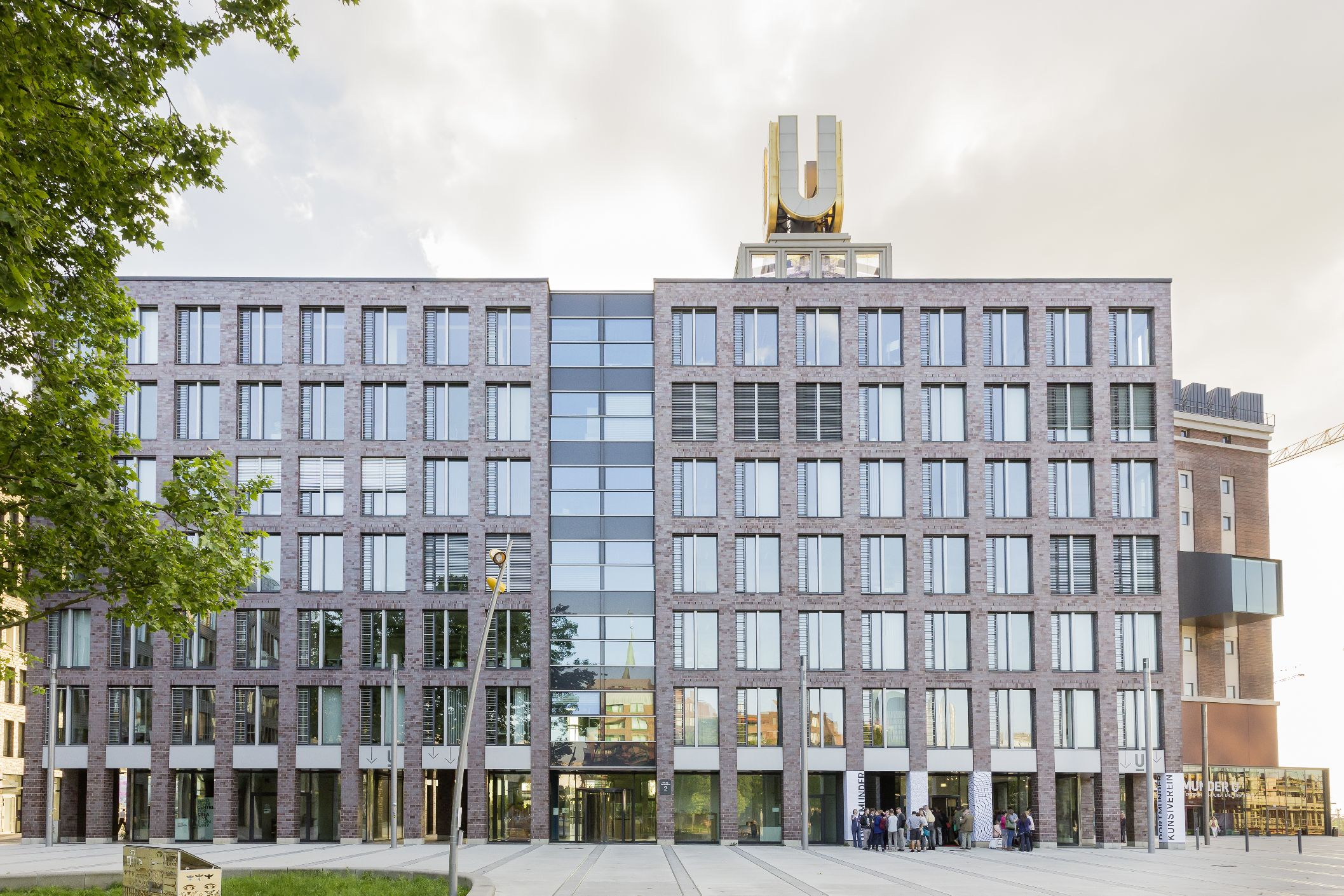 Dortmunder Kunstverein, Park der Partnerstädte 2, 44137 Dortmund